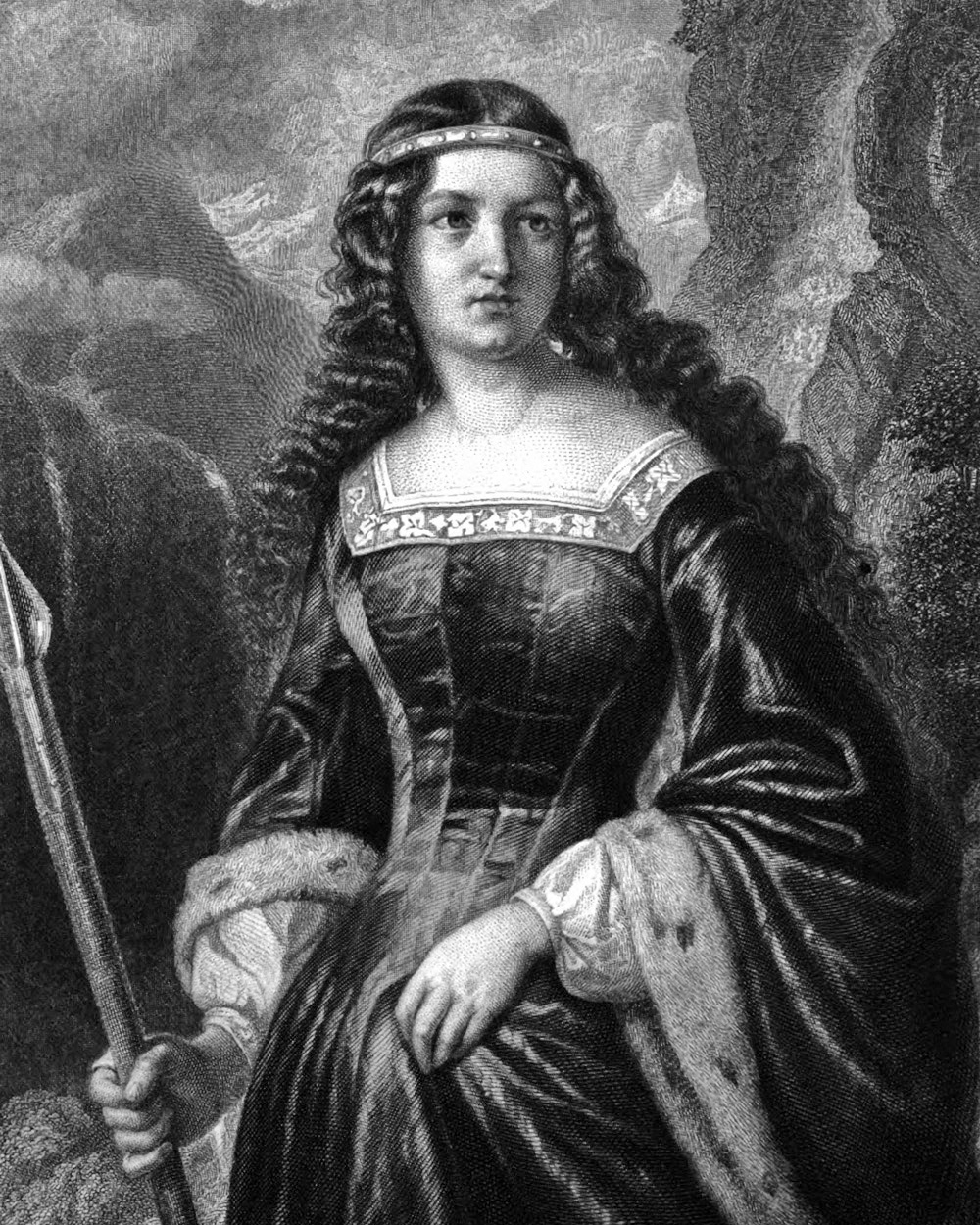 Berta von Bruneck aus Friedrich Schillers Schauspiel Wilhelm Tell, als Stahlstich gestochen um 1859 nach einer Zeichnung von Friedrich Pecht